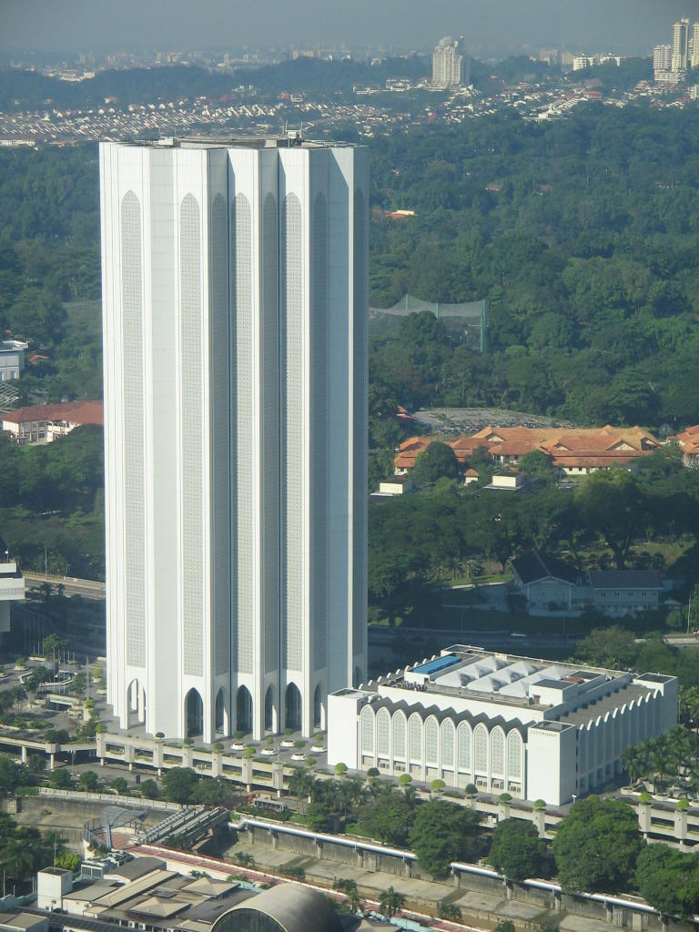 @Hakcipta Yosri, Dibebaskan di bawah